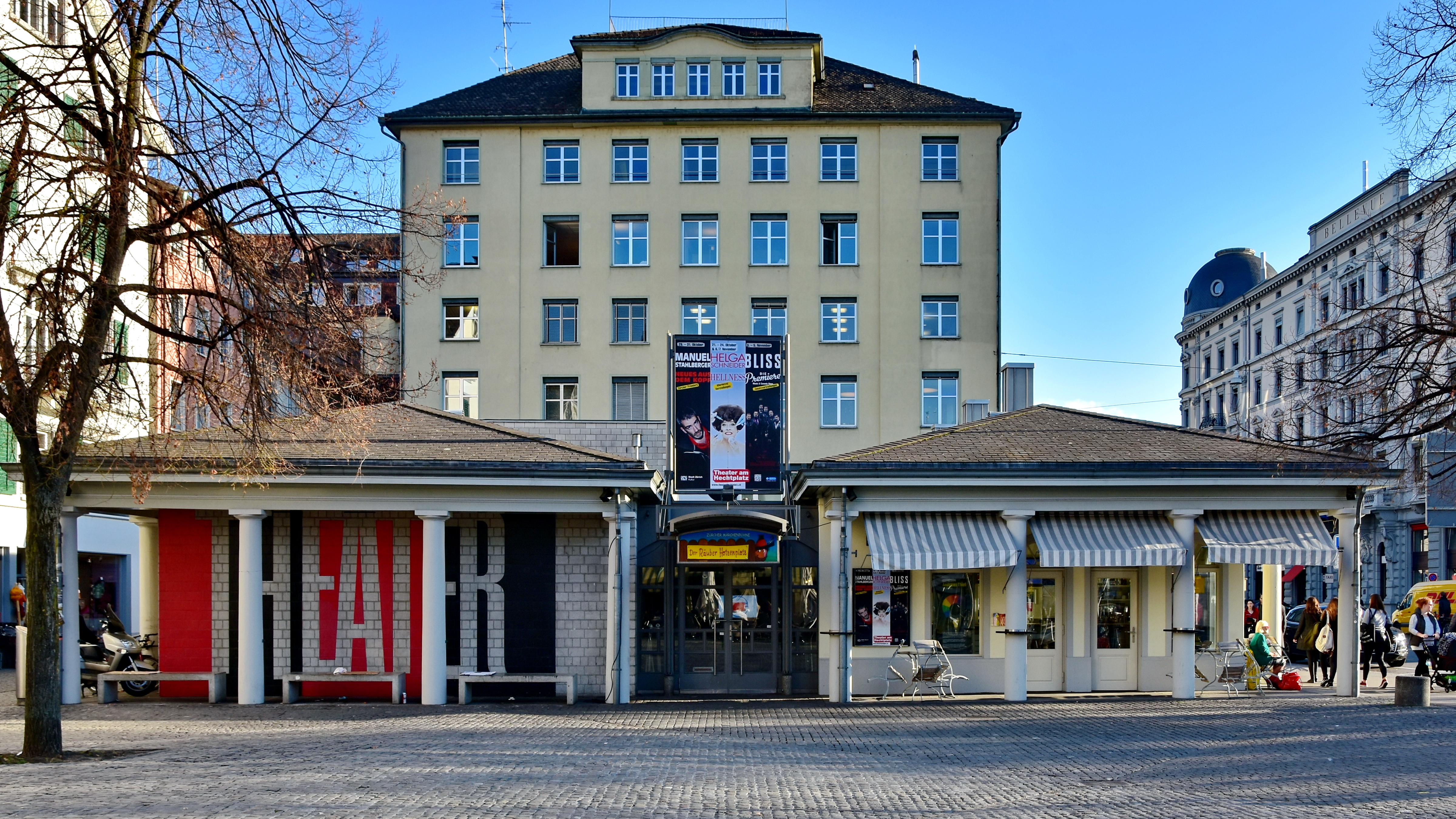 Theater am Hechtplatz, Limmatquai in Zürich (Switzerland)